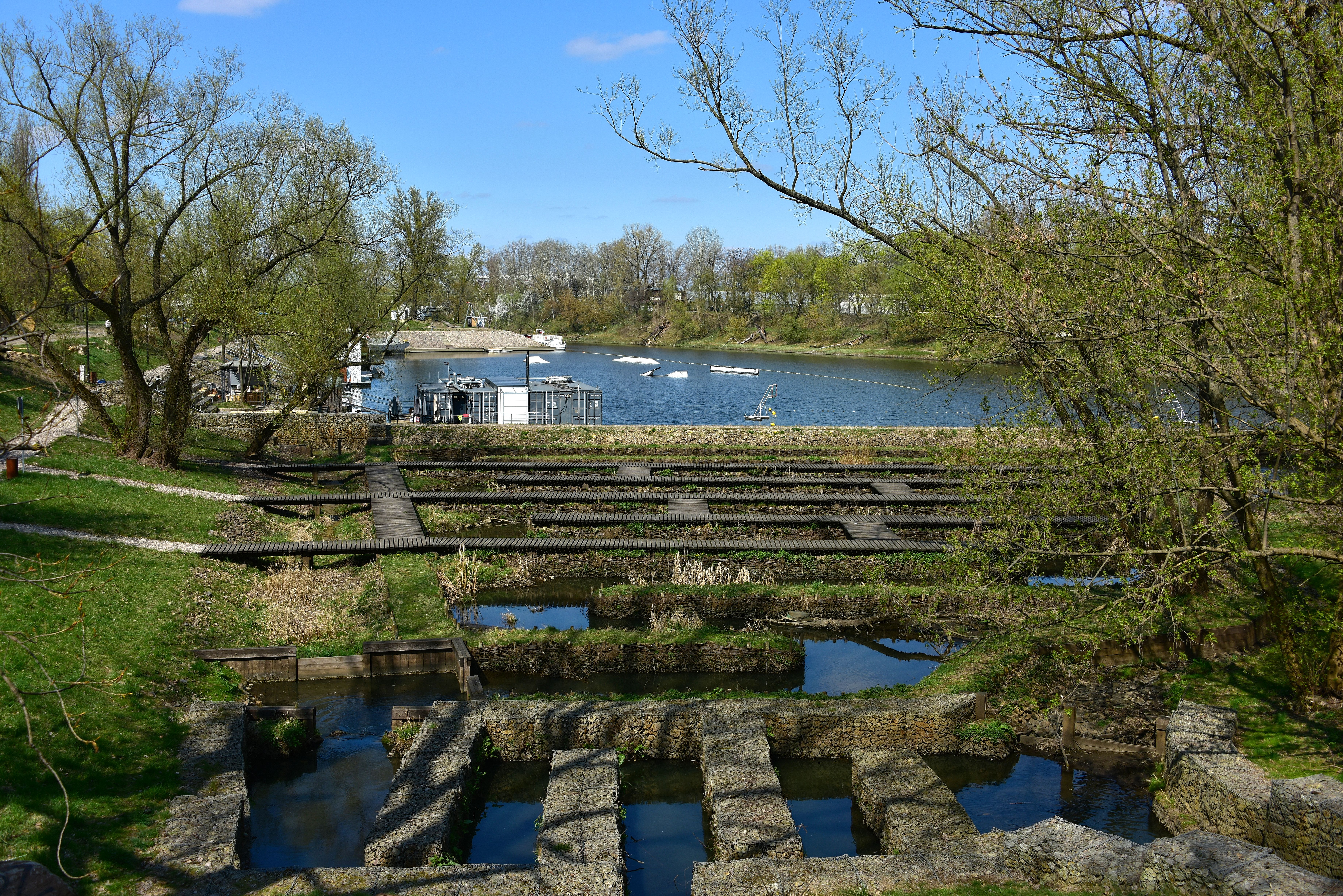 Port Czerniakowski w Warszawie